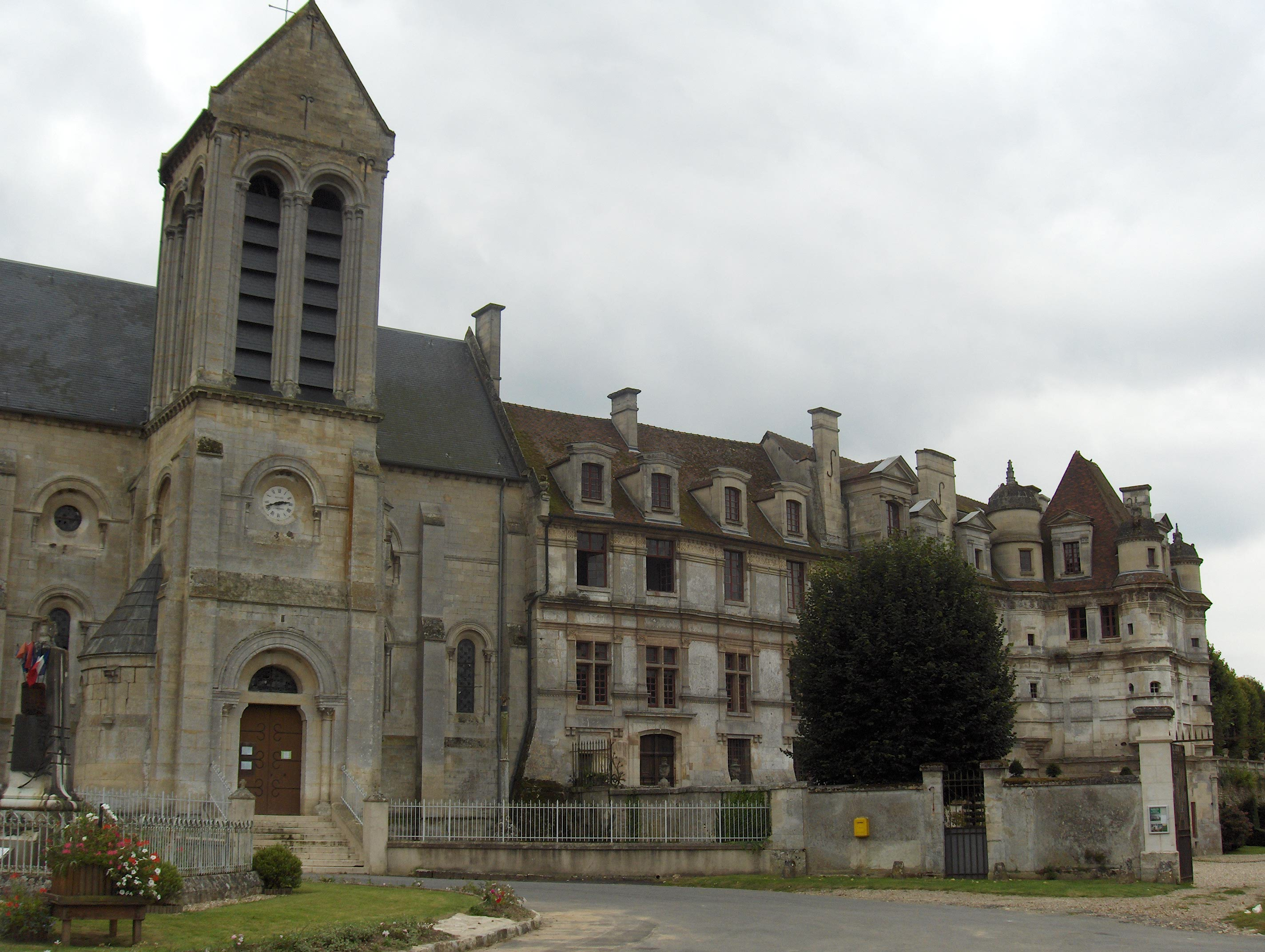 Eglise et château d'Ambleville (Val d'Oise)